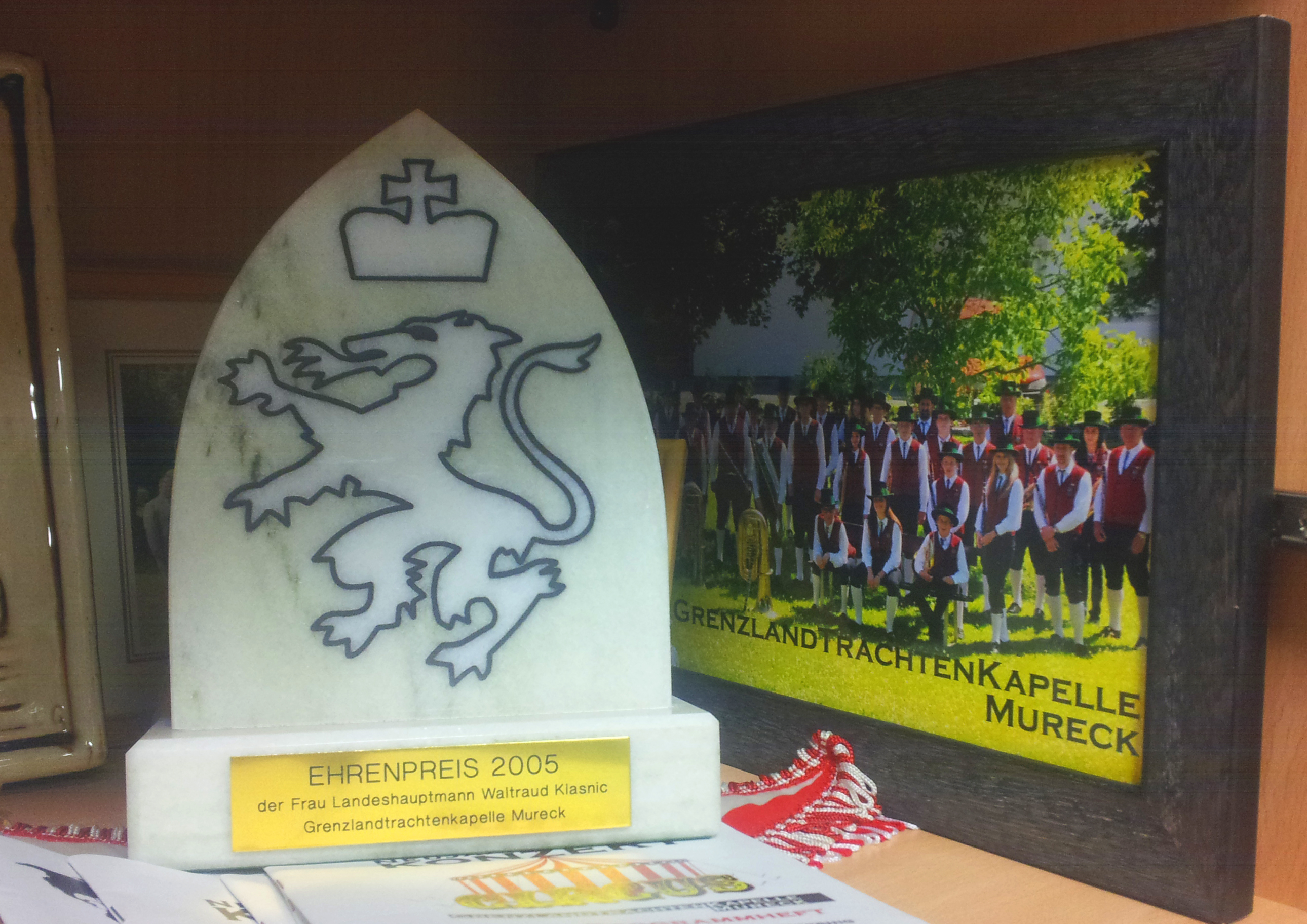 Der Steirische Panther ist ein Preis der vom Land Steiermark an steirische Blaskapellen für die dreimalige Teilnahme an Konzert- bzw. Marschwertung (2 x Konzert, 1 x Marsch oder 2 x Marsch, 1 x Konzert) innerhalb von 5 Jahren mit einer Gesamtpunktezahl von über 210 Punkten verliehen wird.